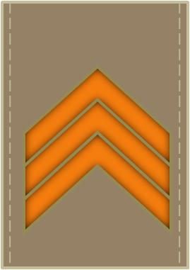 Saudi Arabian military ranks (Vice Sergeant).رقيب